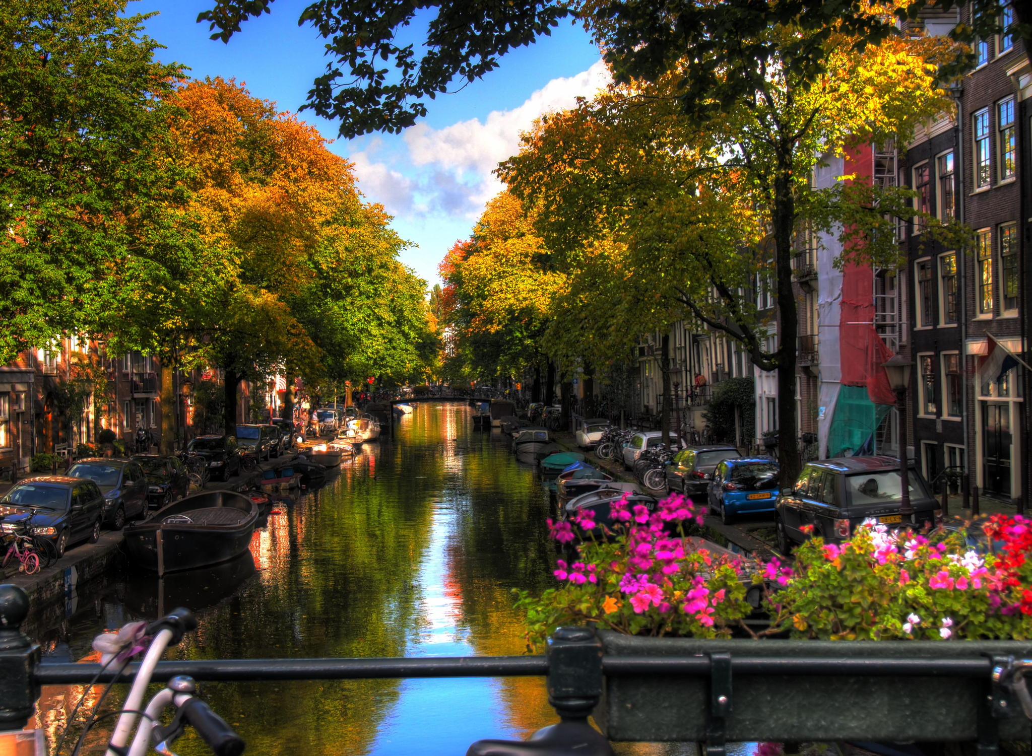 Канал в Амстердаме